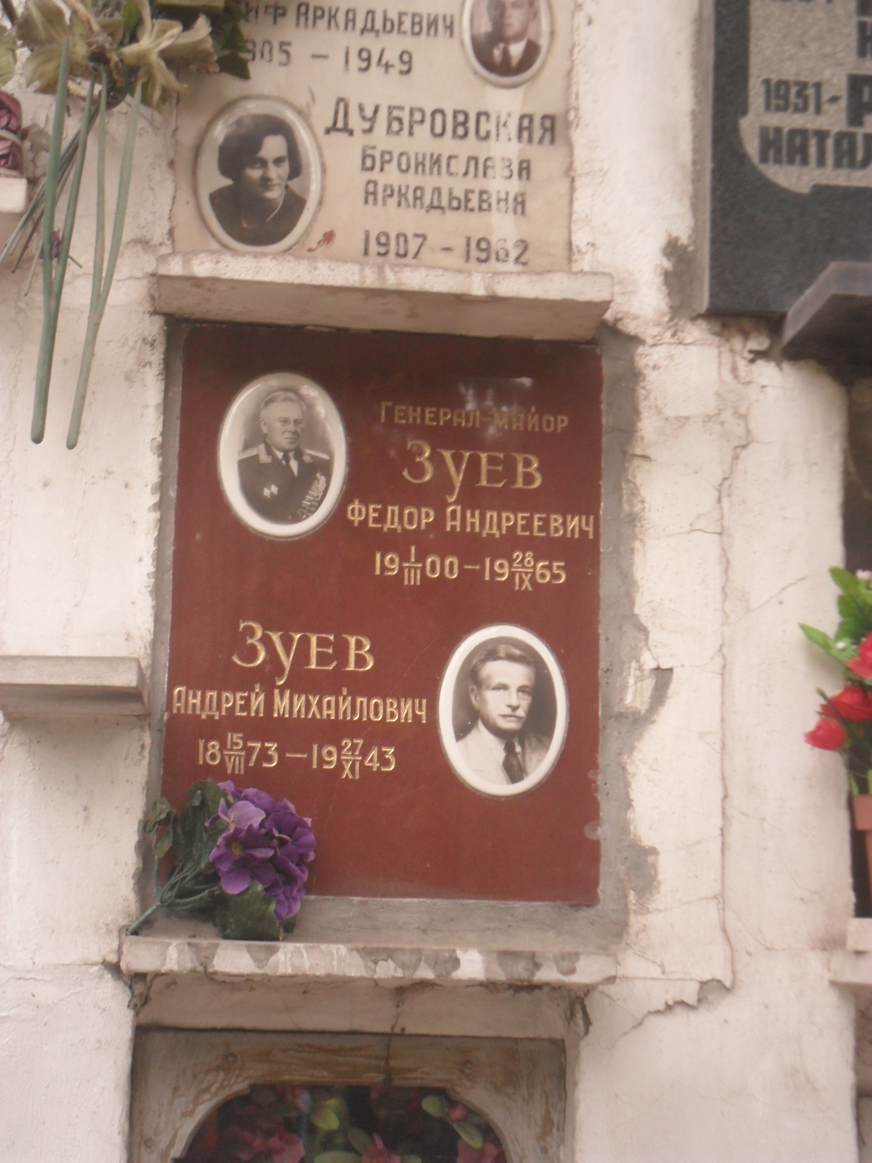 Плита колумбария генерал-майора Фёдора Зуева на Новодевичьем кладбище Москвы.